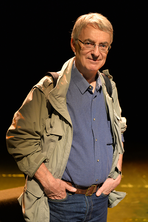 L'auteur de bande dessinée François Bourgeon à la 25e heure du livre, Le Mans, octobre 2014.